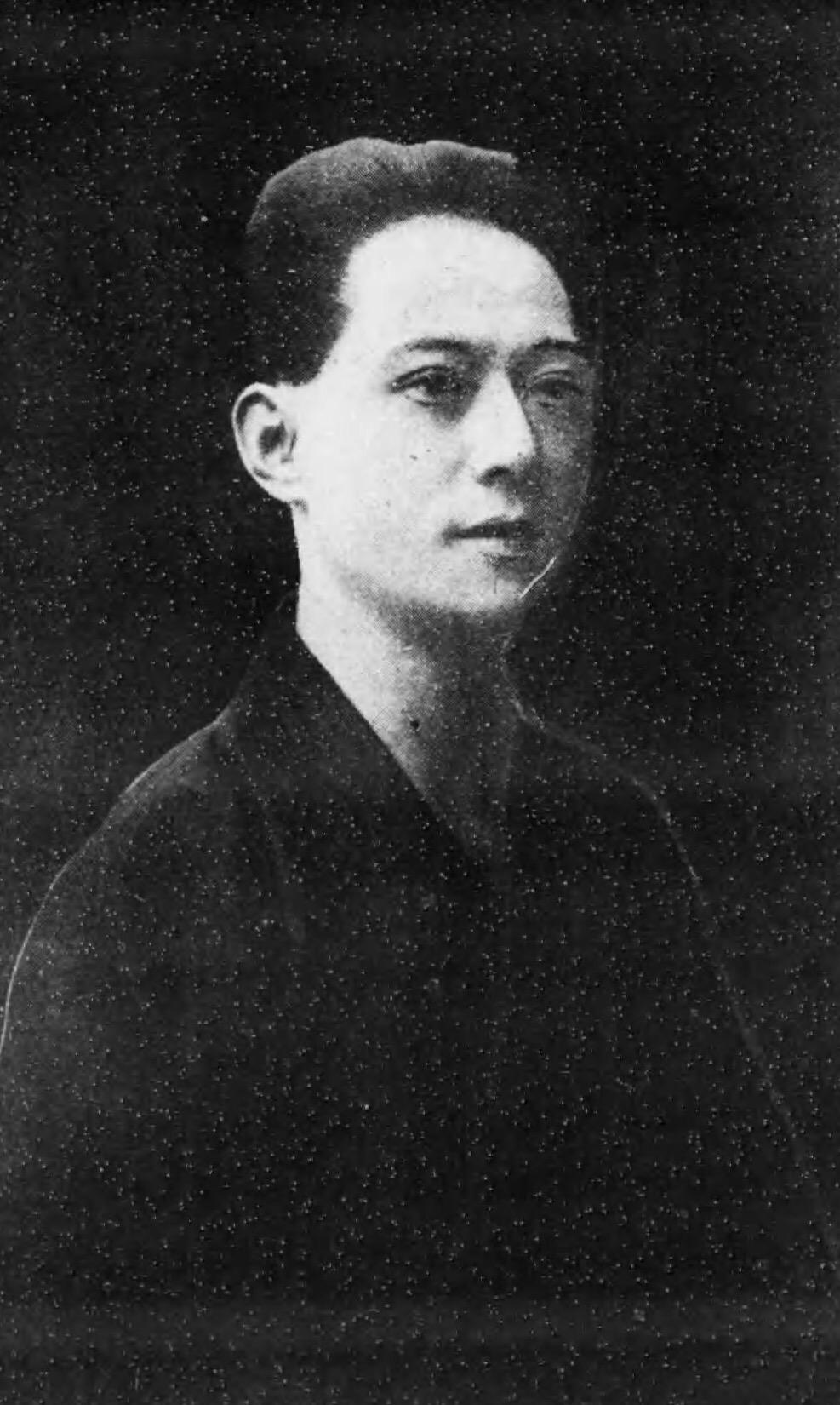 1920年の写真。